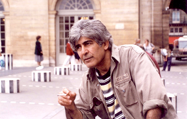 الشاعر سركون بولص الشاعر سركون بولص الذي عشتُ معه قُرابة عام في ألمانية كان حقاً كالراهب بدون ديرٍ وكانت القصيدة هي محرابهُ وغربته عن وطنه العراق والحنين لأمه يقض مضجعهُ كان الراحل سركون ممن يؤمن بأن القصيدةهي التي تؤدي إلى رازخ الروح لتستنهض فيها مكنوناتها العصية.بقي أن نقول كان سركون بولص سيزيف العصور ولستُ مجانباً الحقيقةإذا قلتُ كان بيتاً كبيراً للشعراء يحتويهم بروحه السمحة وهو علامة فارقة في الشعر العربي. الشاعر والأديب اسحق قومي ألمانيا 2007م